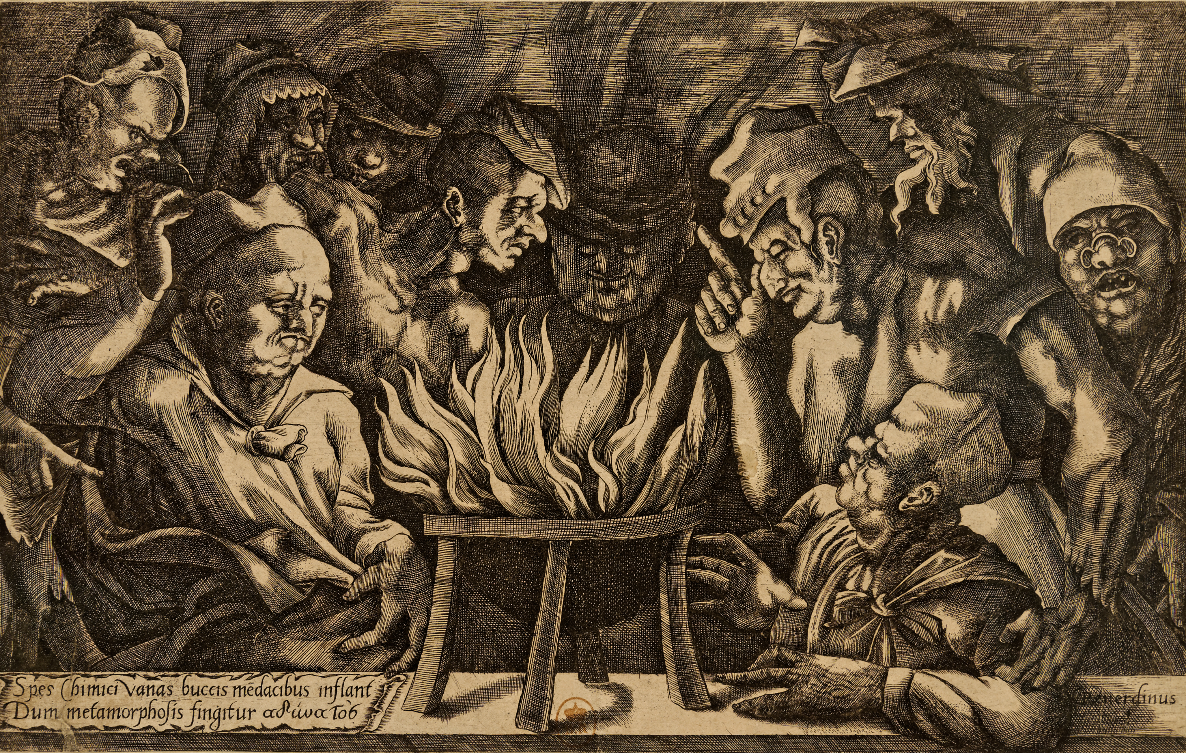 George Reverdy. Les Alchimistes. Burin. H. 16,5 ; l. 26 cm. Paris, Bibliothèque nationale de France, Rés. Ec 33a Exposition : Lyon Renaissance. Arts et humanisme.